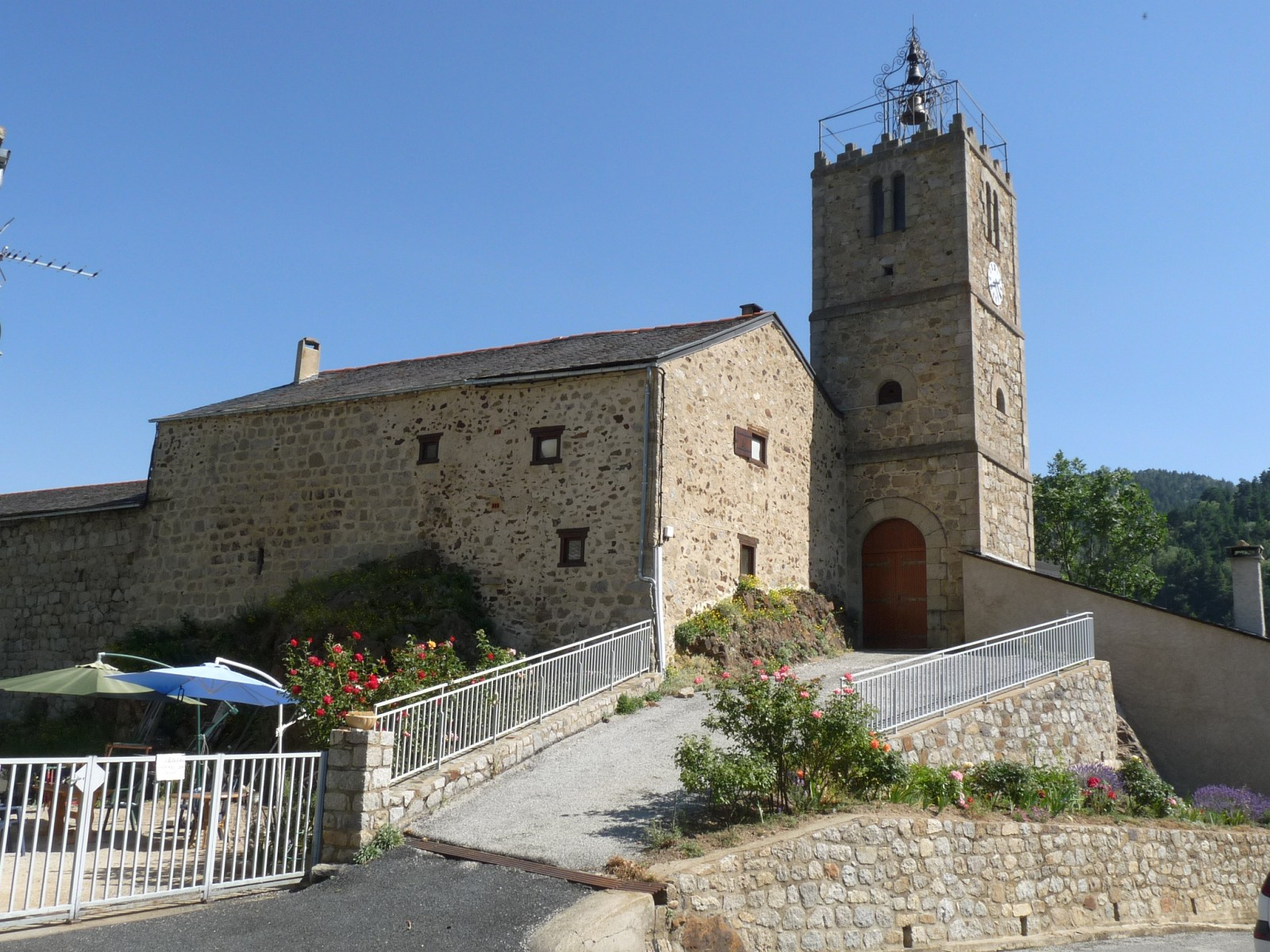 Eglise de Railleu, Pyrénées-Orientales, France